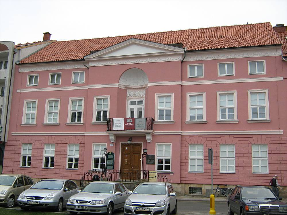 Pałac rodziny von Braunschweig przy ul. Armii Krajowej w Kołobrzegu.